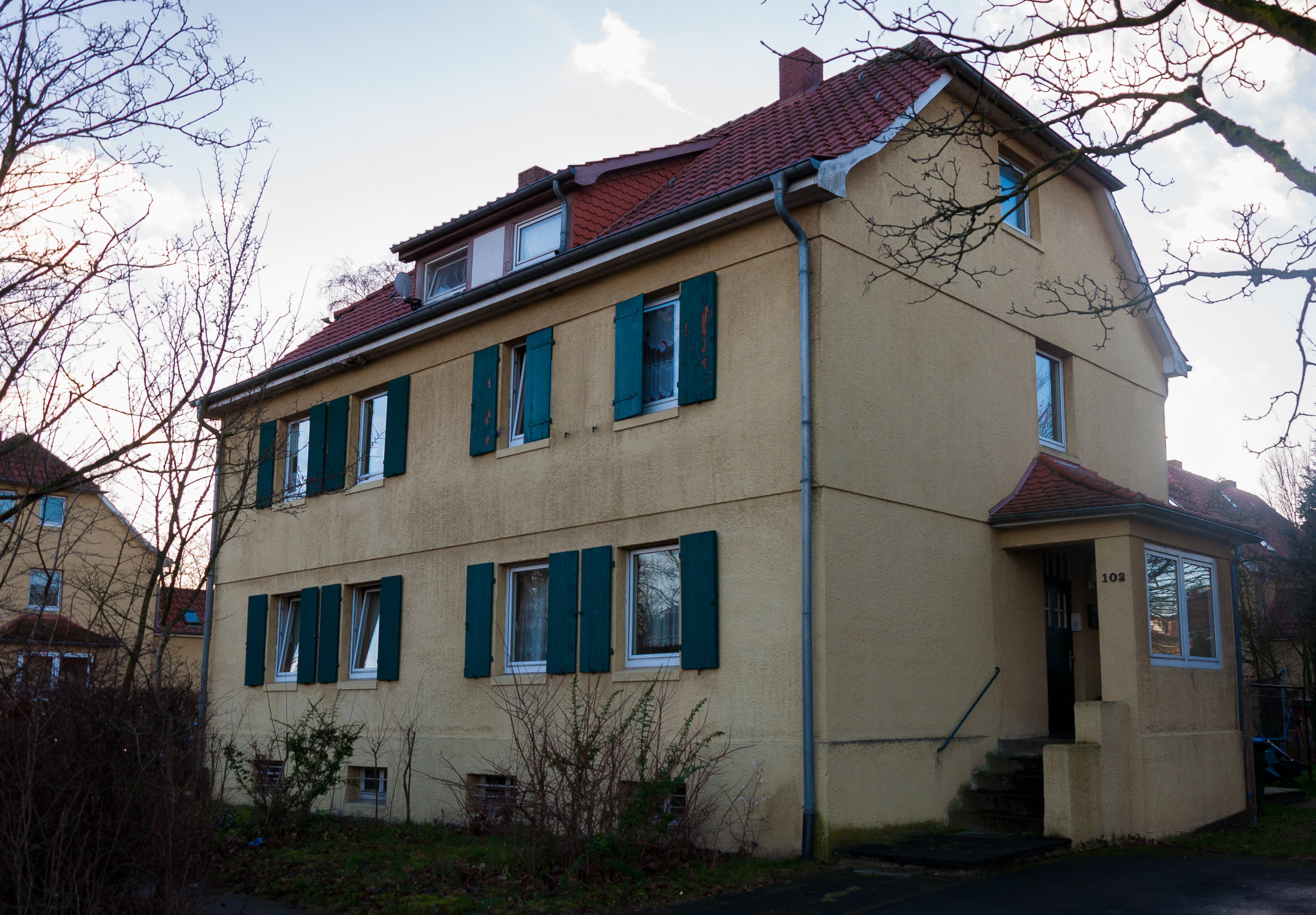 Haus Am Kamphof Gütersloh, Teil des Denkmalensembles "Am Kamphof"